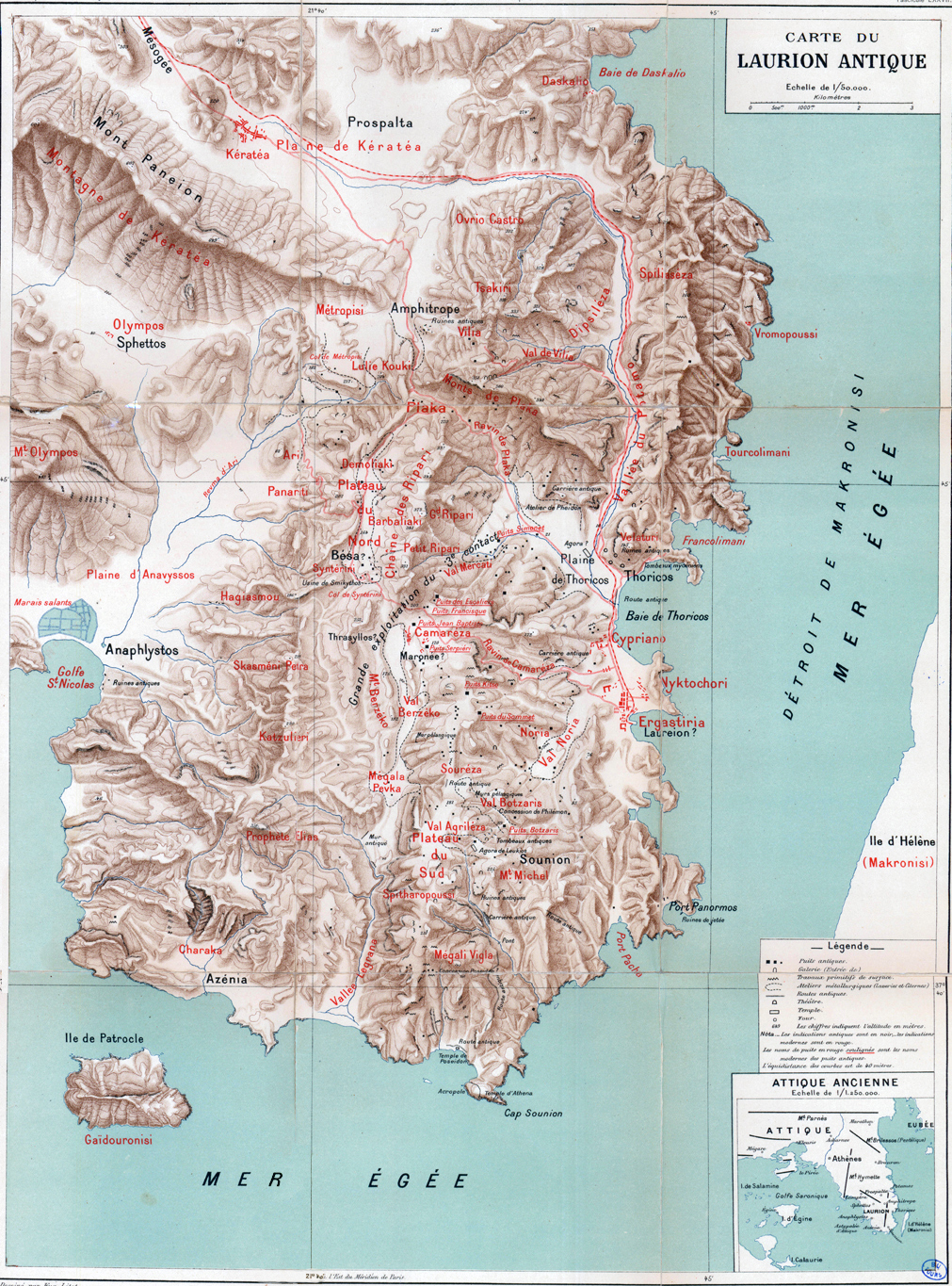 Mapa detallado de la región de Laurión y de sus minas. Fotografía de una ilustración de la obra, libre de derechos, de Edouard Ardaillon Les mines du Laurion dans l'Antiquité (Las minas de Laurión en la antigüedad), Fontemoing, París, 1897.